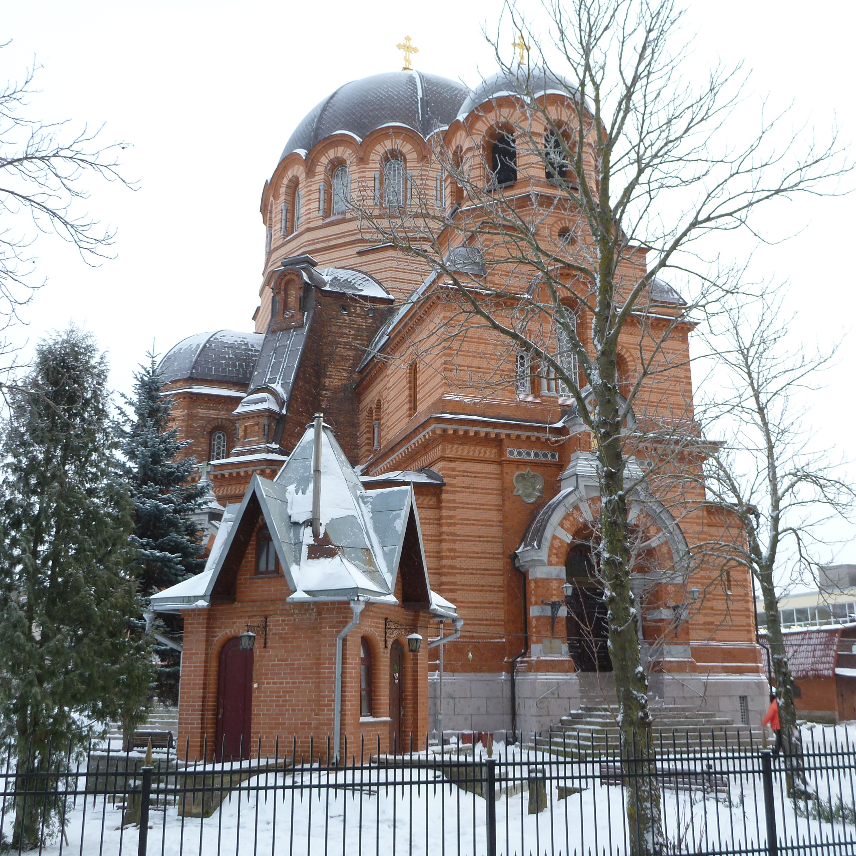 Narvan ortodoksinen kirkko